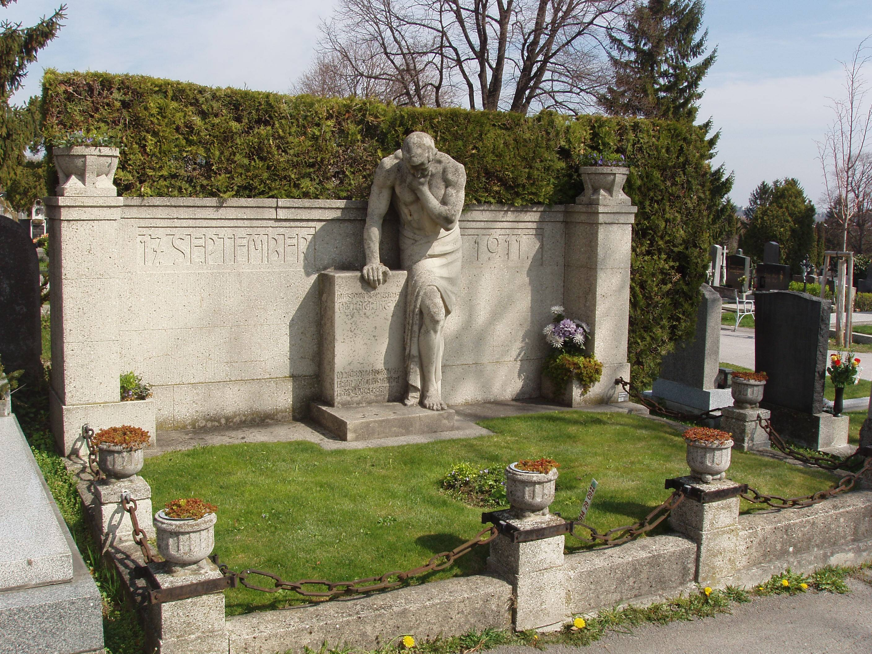 Denkmal für die Opfer der Wiener Teuerungsrevolte vom 17. September 1911 am Ottakringer Friedhof